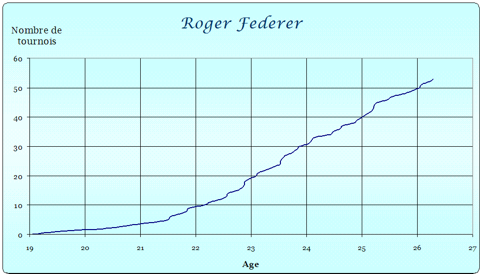 Courbe représentant le nombre de tournois remportés par Roger Federer au cours du temps